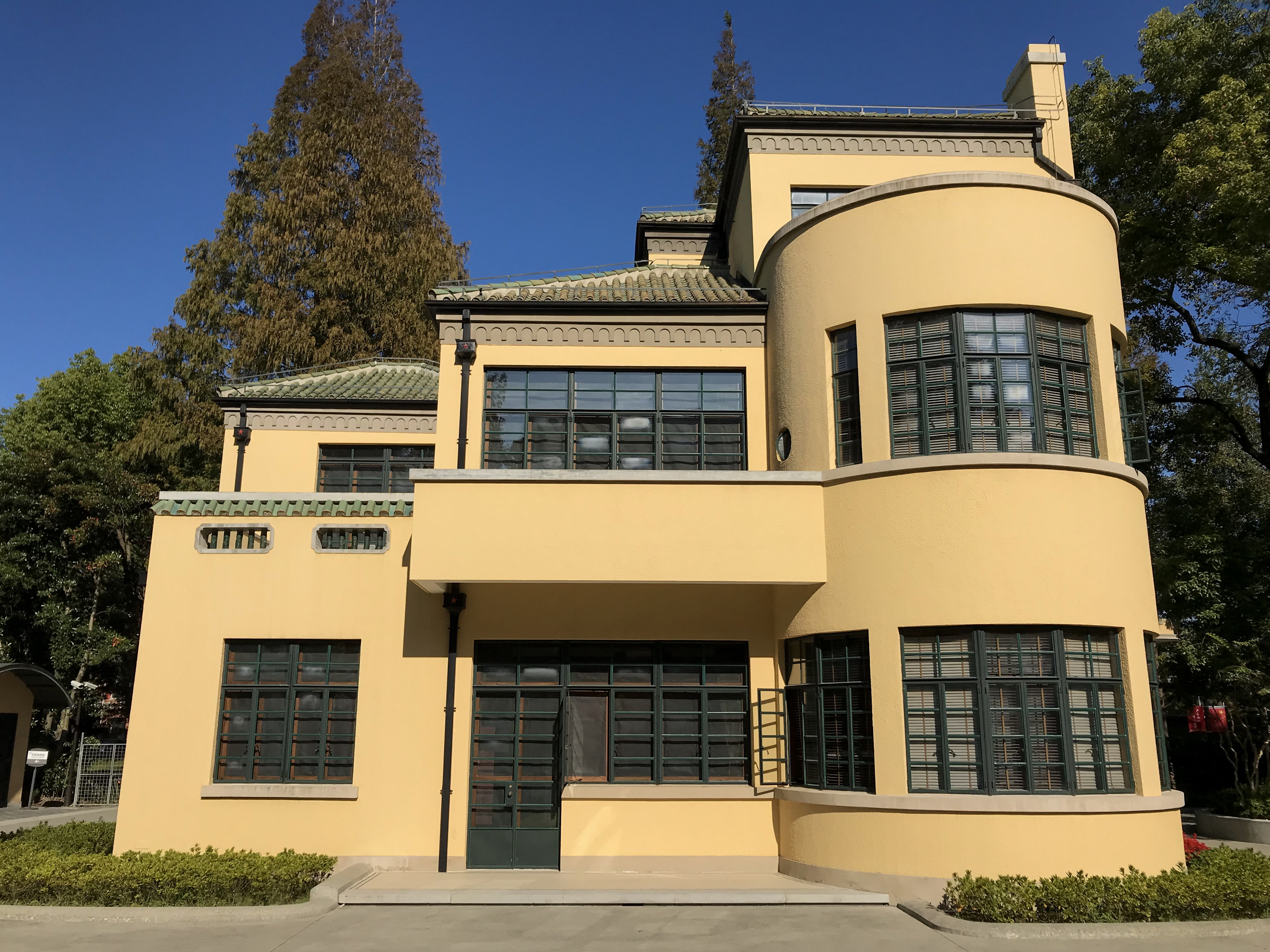 中文（中国大陆）: 陈望道旧居